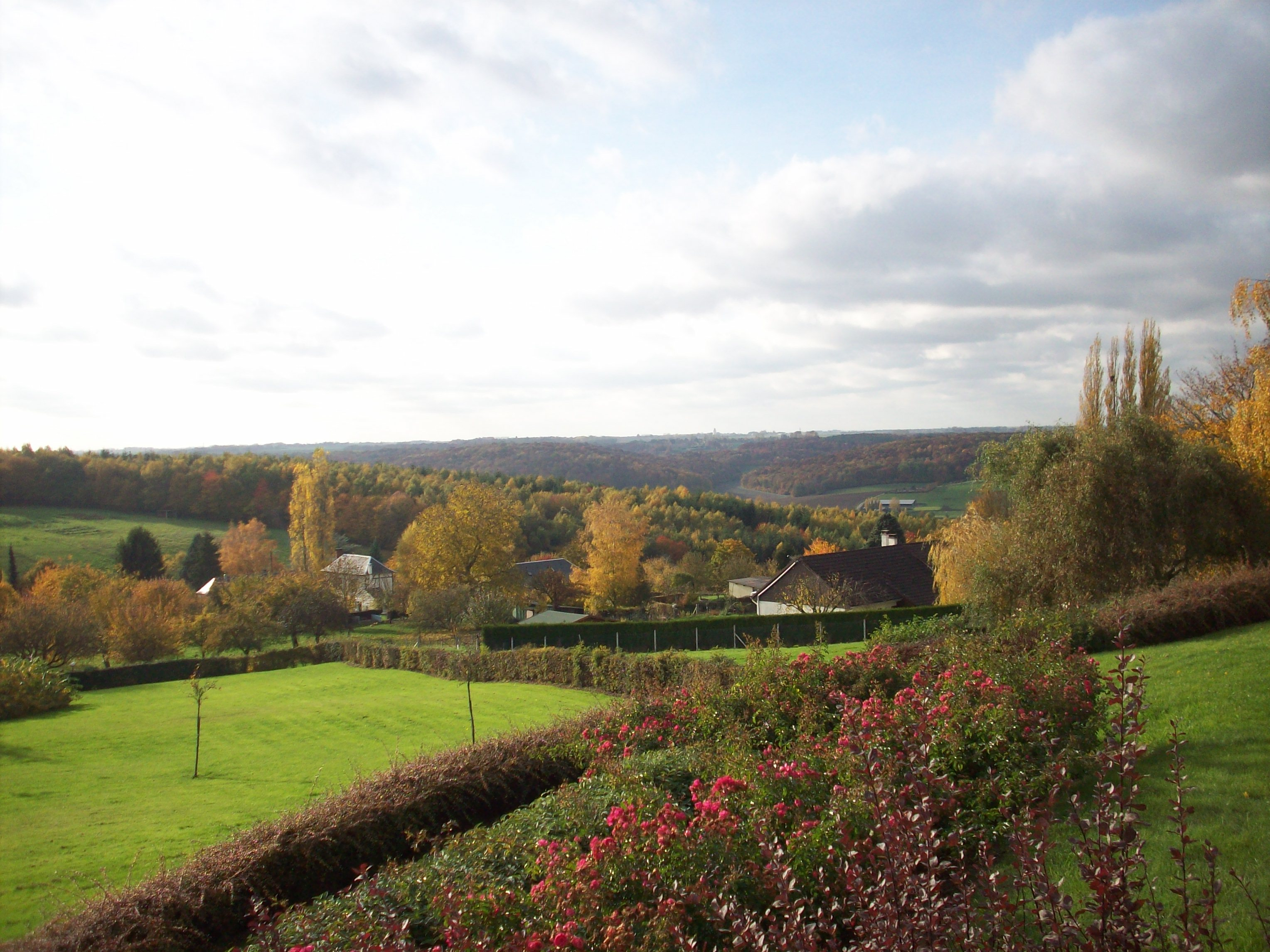 Panorama visible depuis la mairie des Hogues.